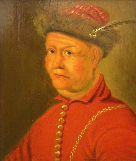 Hessel fan Martena (1460-1517)